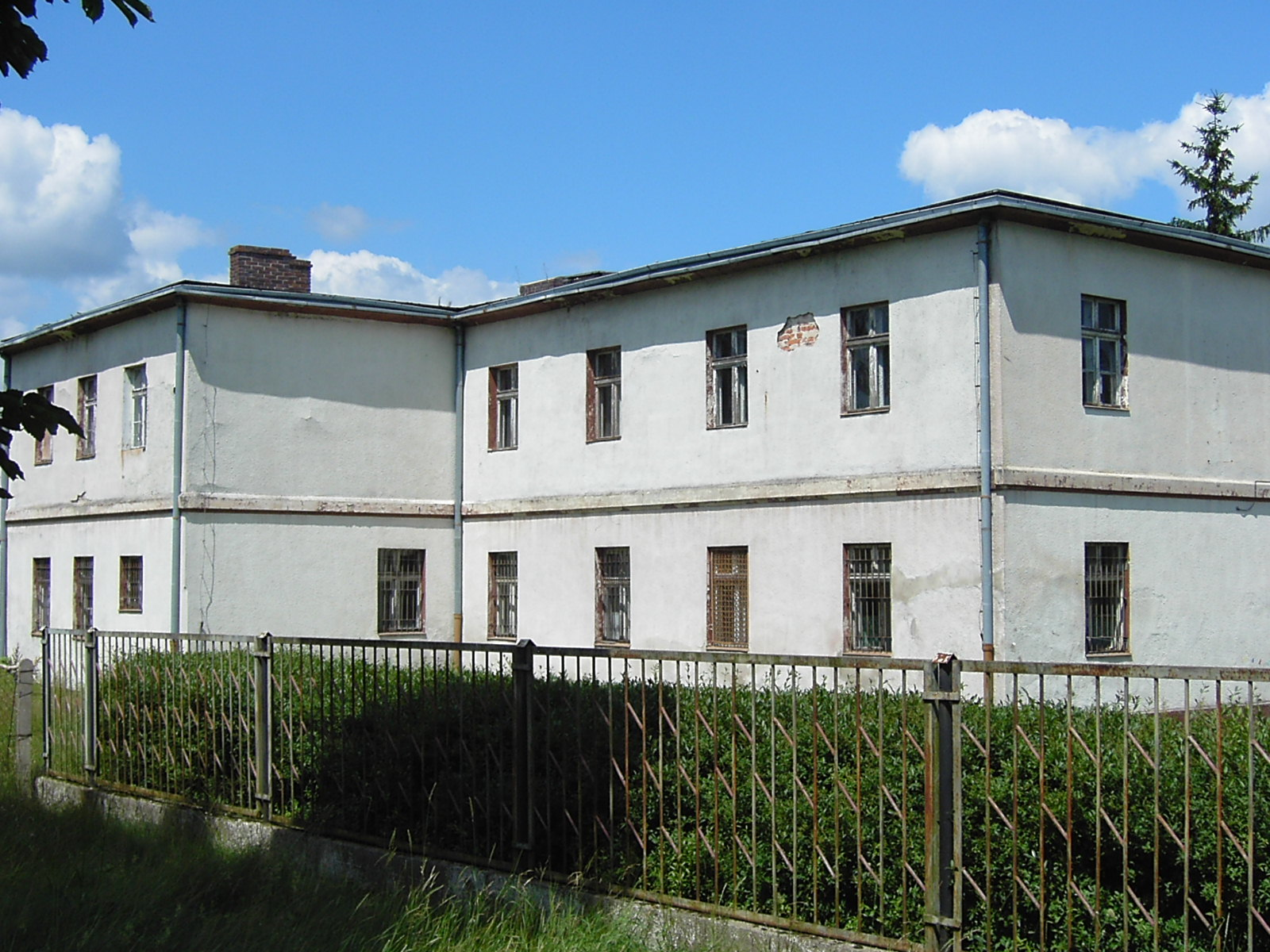 Była strażnica WOP w Żytowaniu